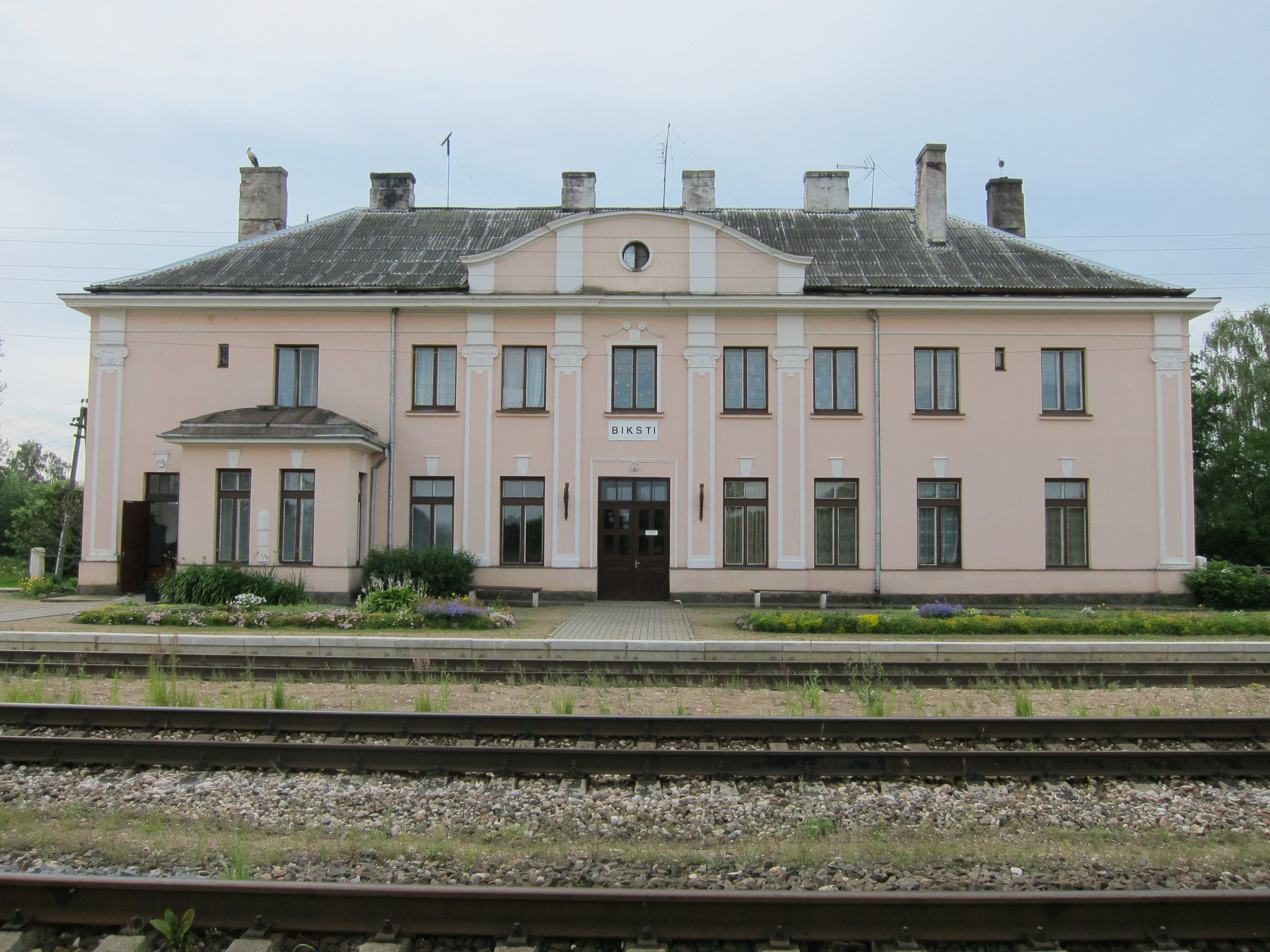 Bikstu stacijas ēka un sliežu ceļi